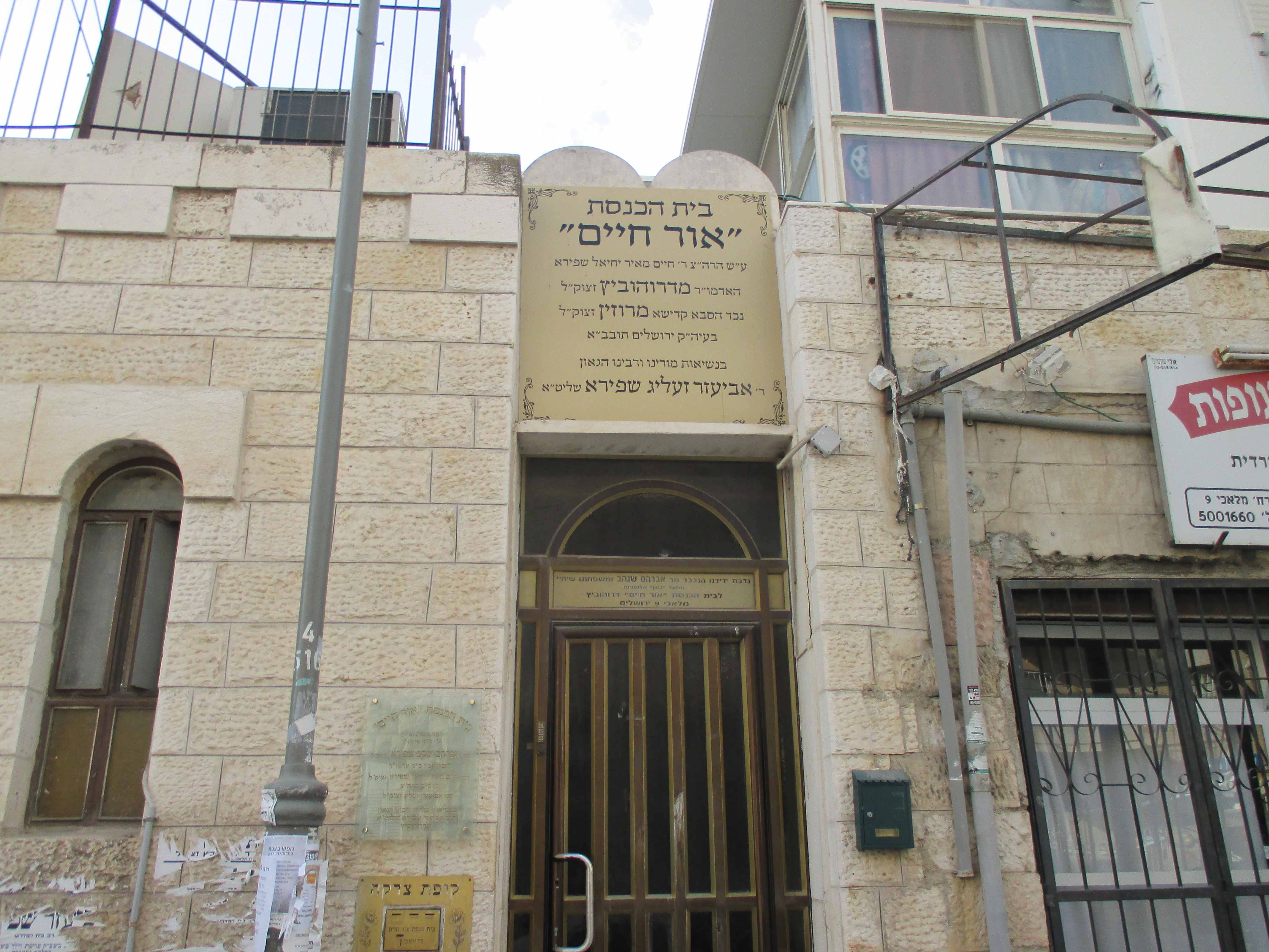 בית המדרש של חסידות דרהוביץ' ברחוב מלאכי בירושלים